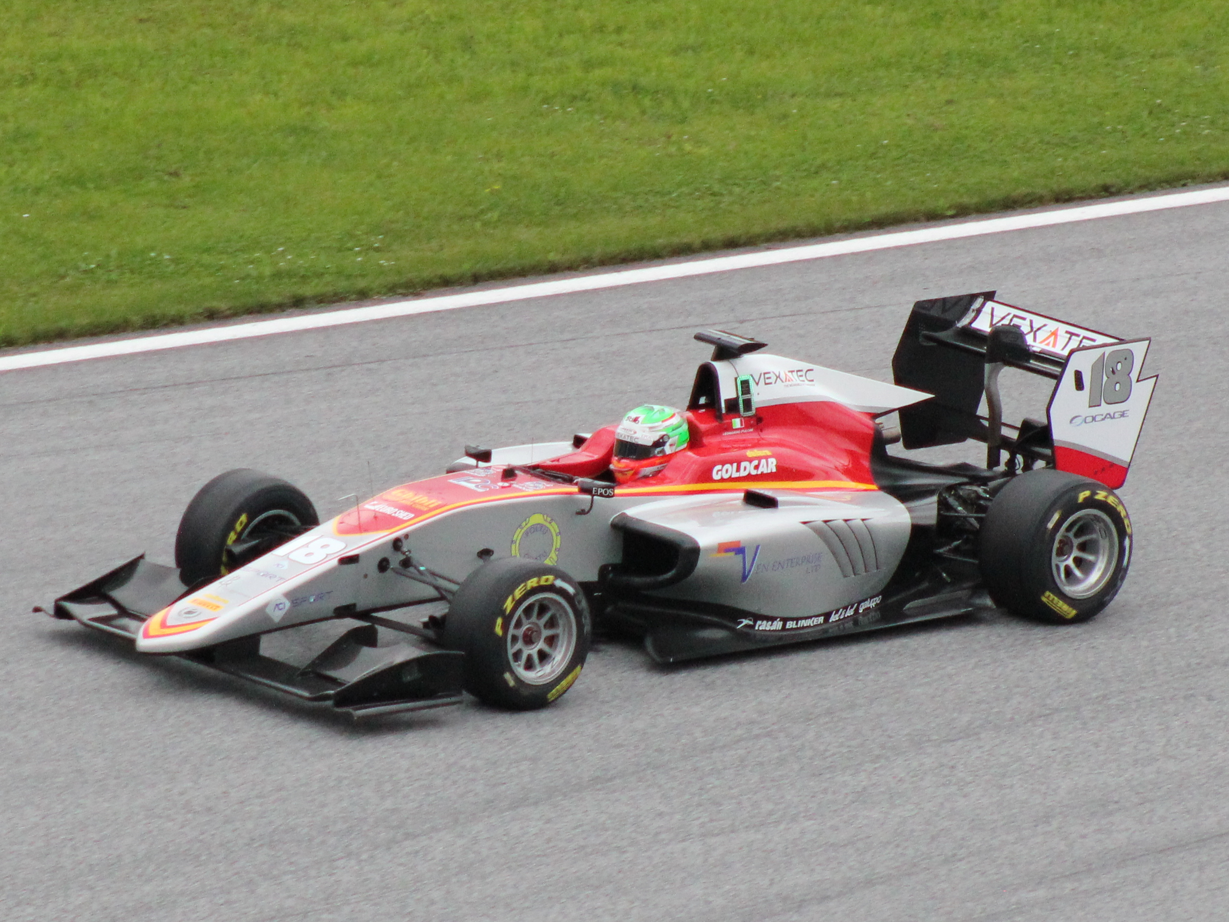 18 Leonardo Pulcini beim Rennwochenende in Österreich 2018